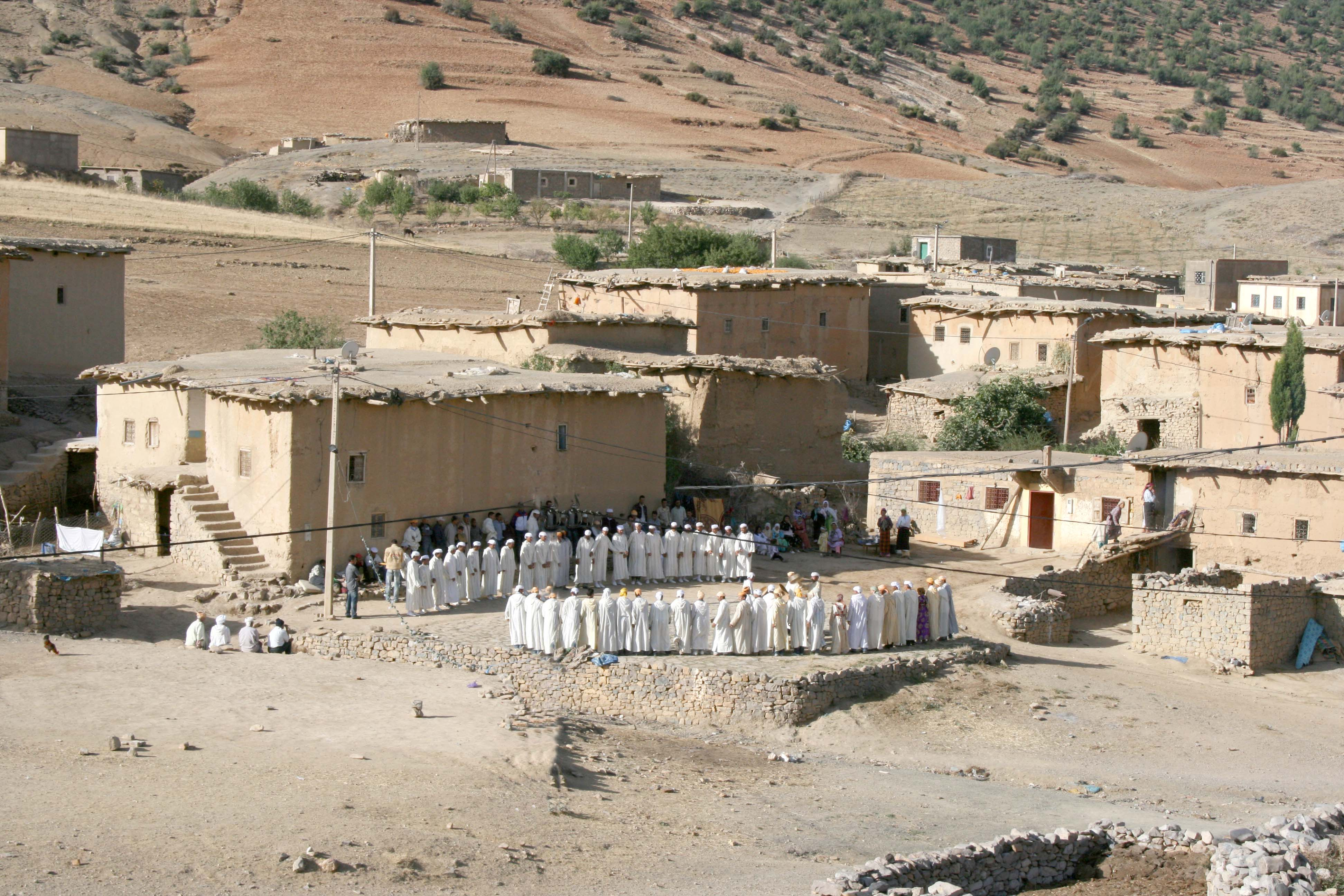 Danse Ahidous des Zayans région de de Khénifra.